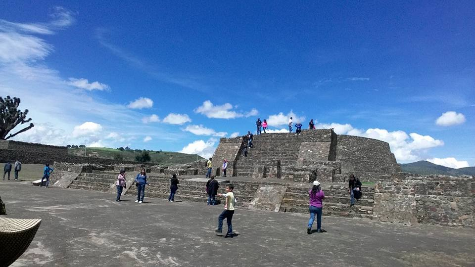 ZA de Tecoaque